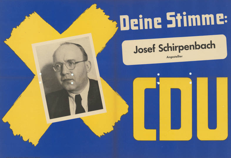 Deine Stimme: Josef Schirpenbach Angestellter CDU Abbildung: Porträtfoto - Stimmkreuz Plakatart: Kandidaten-/Personenplakat mit Porträt Objekt-Signatur: 10-009 : 157 Bestand: Landtagswahlplakate Nordrhein-Westfalen (10-009) GliederungBestand10-18: Landtagswahlplakate Nordrhein-Westfalen (10-009) » Landtagswahl am 18.6.1950 » CDU » mit Porträtfoto Lizenz: KAS/ACDP 10-009 : 157 CC-BY-SA 3.0 DE